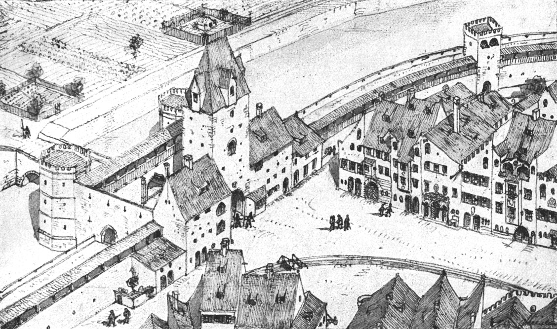 29. Das Isartor (Innenseite).